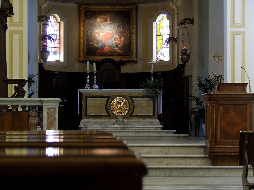 Cattedrale di San Paolo, Alatri. Interno